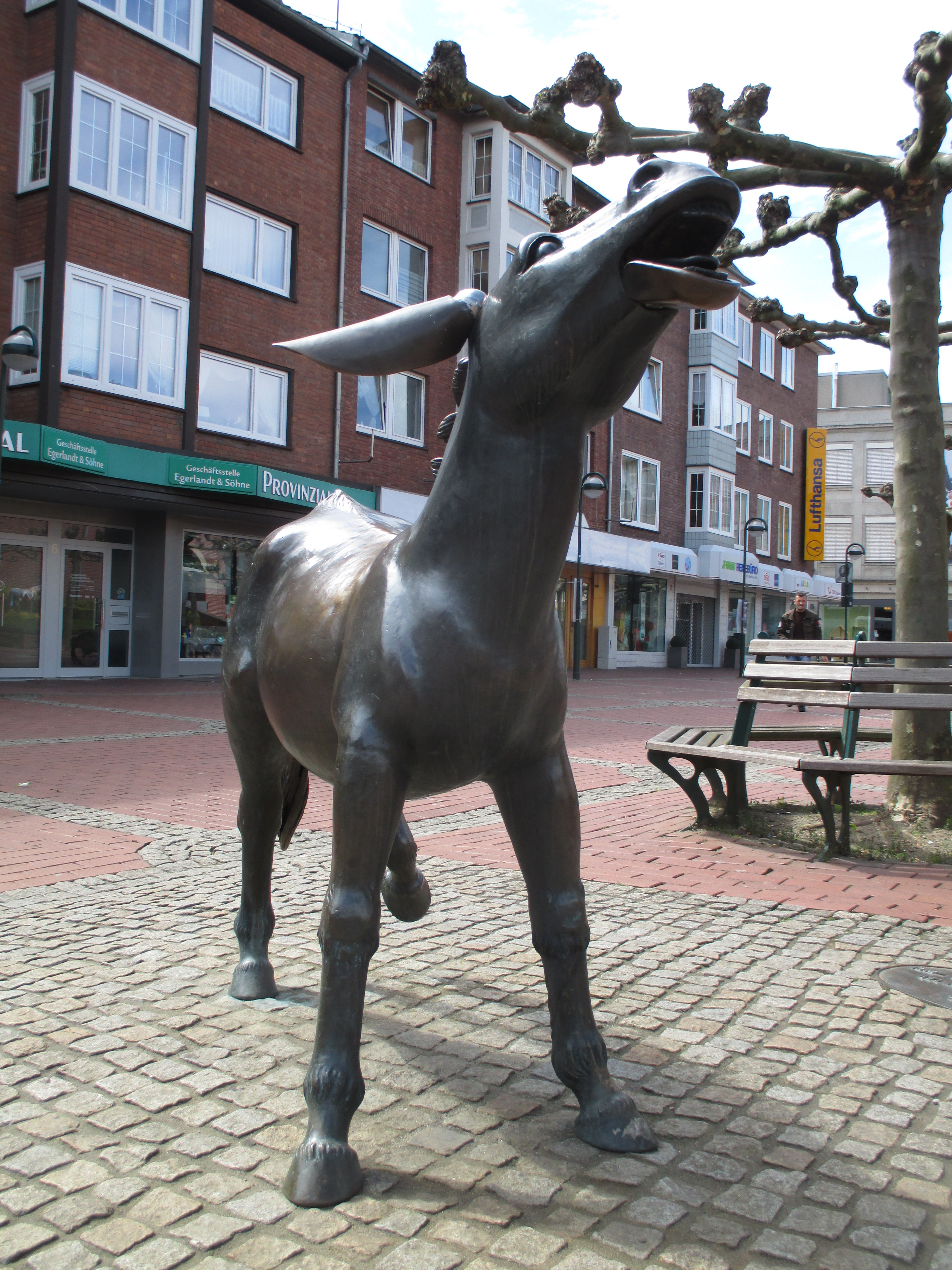 Action-Bronzefigur von Bonifatius Stirnberg am Berliner Tor. Ohren, Unterkiefer und Schwanz sind beweglich und können dem Esel ein schräges Aussehen geben. Leider sind die Körperteile schon ziemlich durchgenudelt und bleiben nicht mehr auf Position.